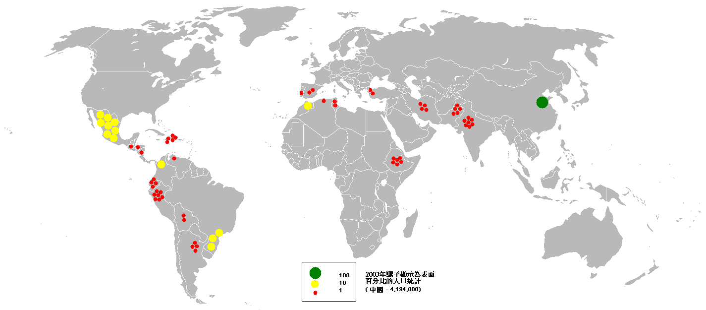 2003年騾的世界分布圖